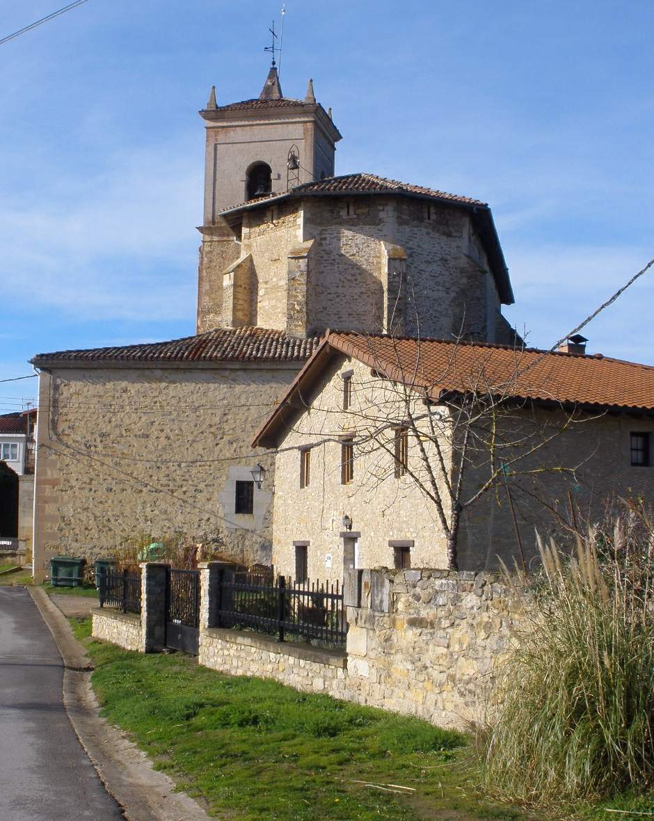 Aberásturi (Álava) - Iglesia de San Esteban